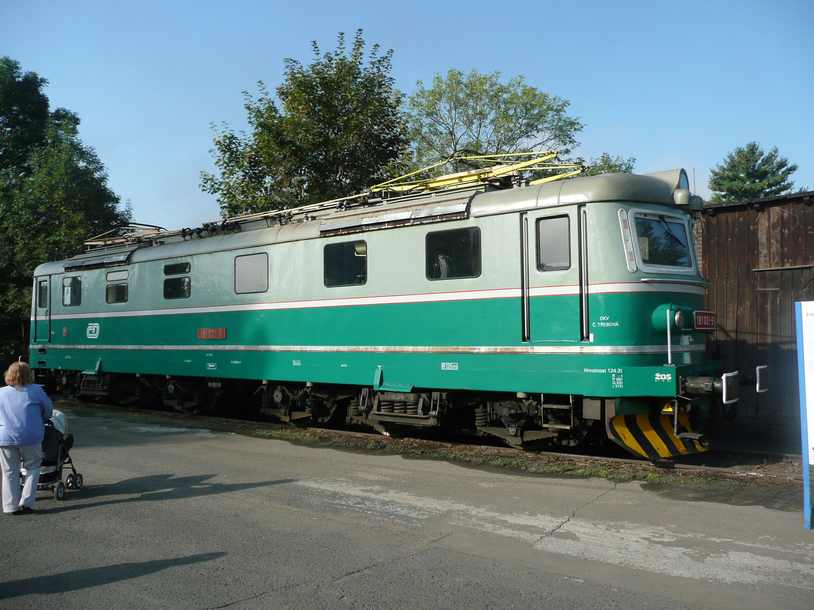 181.001 auf einer Fahrzeugausstellung in Decin